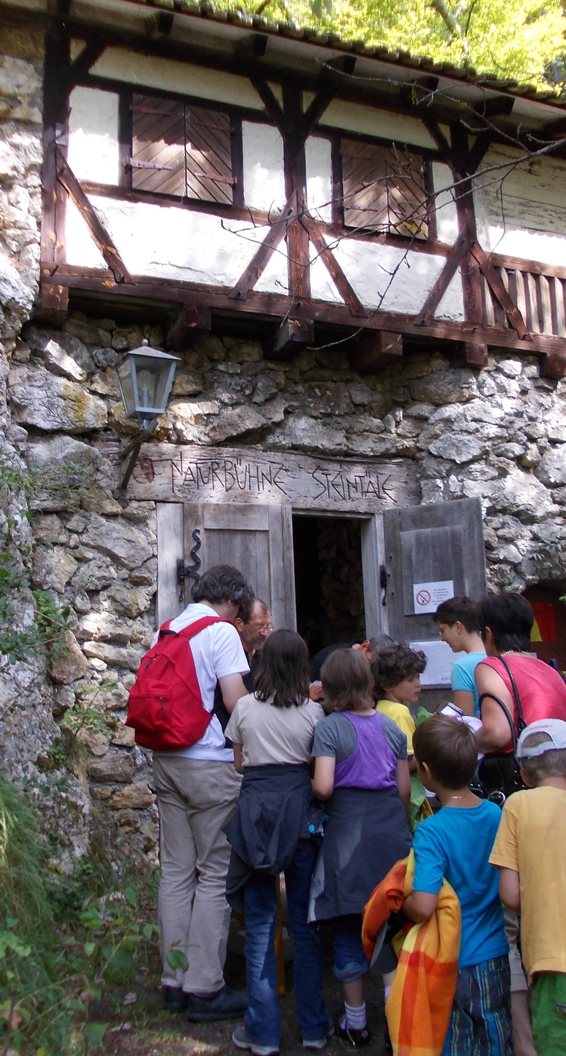 Besucher der Freilichtbühne Steintäle Fridingen, Aufführung von Schneewittchen und die sieben Zwerge am 3. September 2011